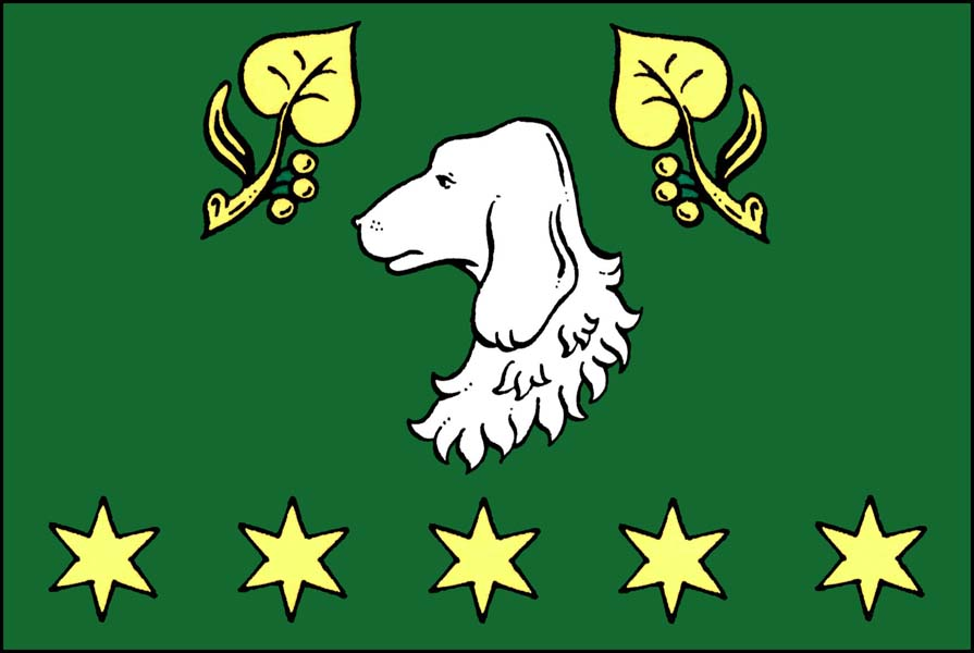 Vlajka obce Ohaře